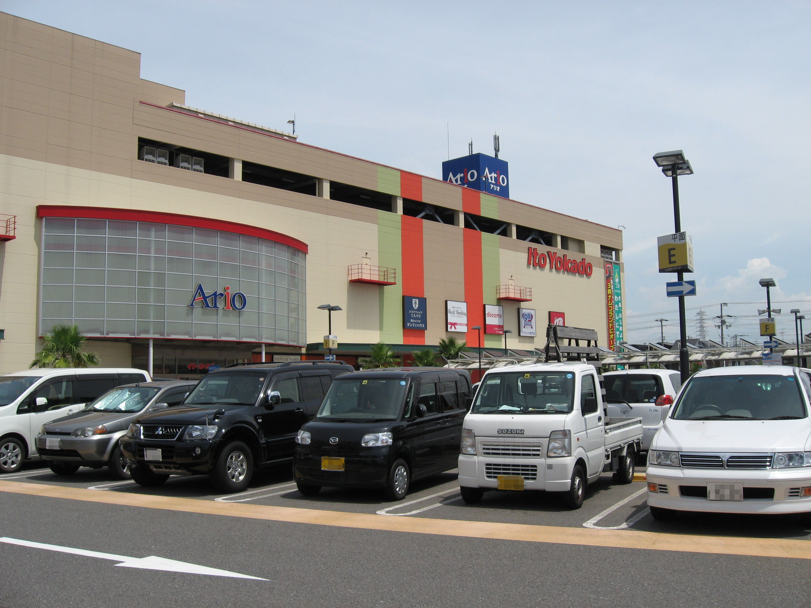 アリオ鳳（堺市）